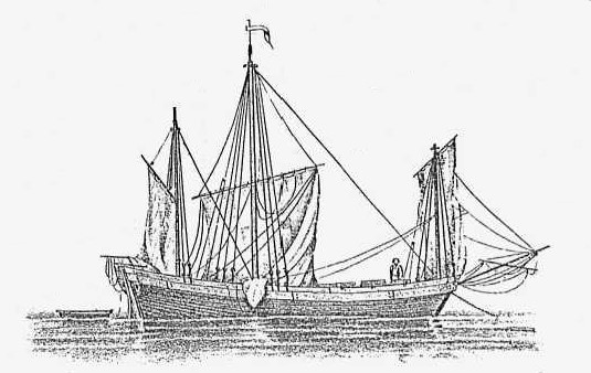 Раньшина